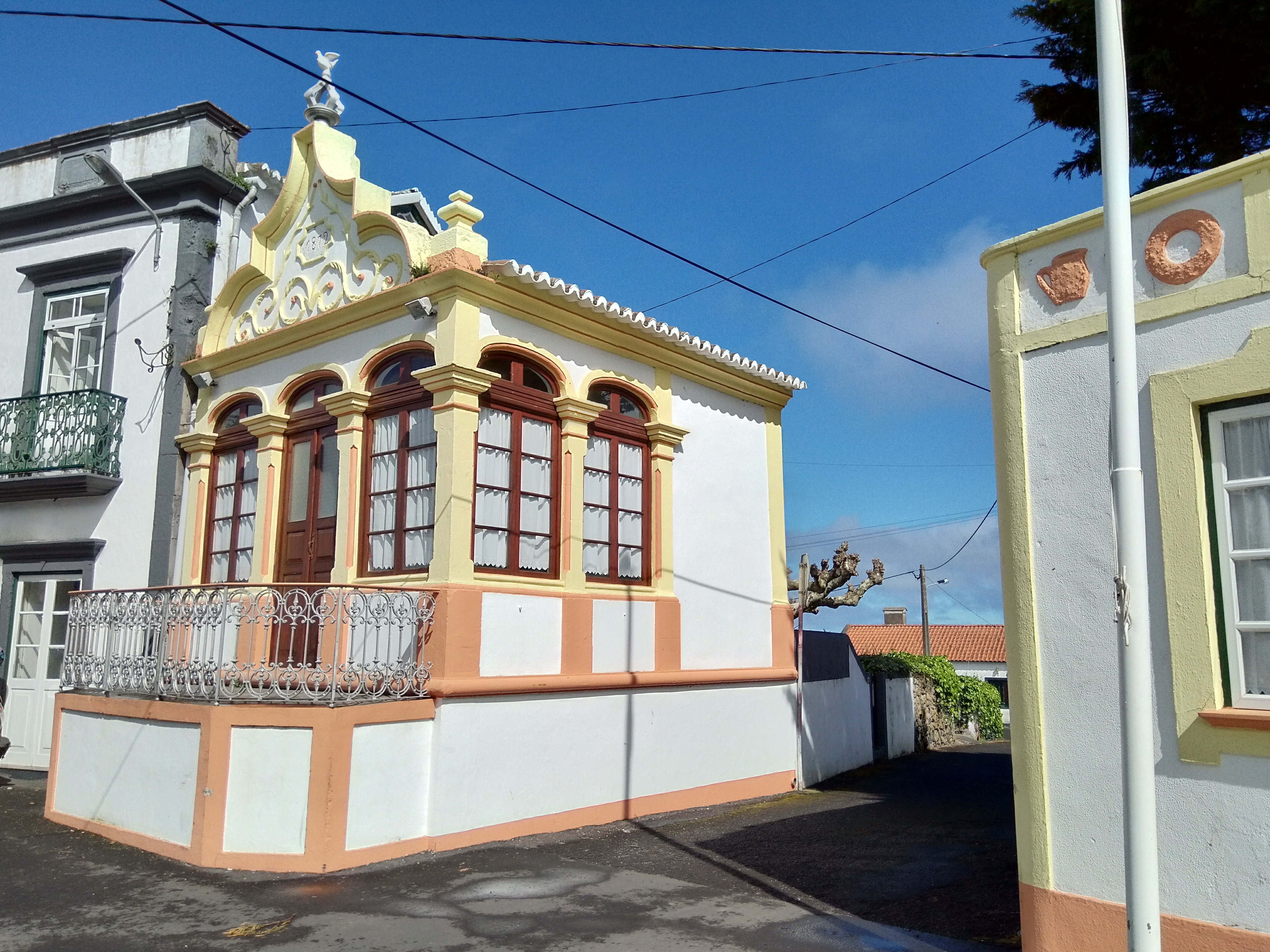 Império do Espírito Santo, freguesia dos Biscoitos, concelho de Praia da Vitória, Ilha Terceira, Região Autónoma dos Açores, Portugal.